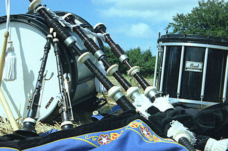 Le costume du bagad d'Ergué-Armel-Quimper et ses instruments.